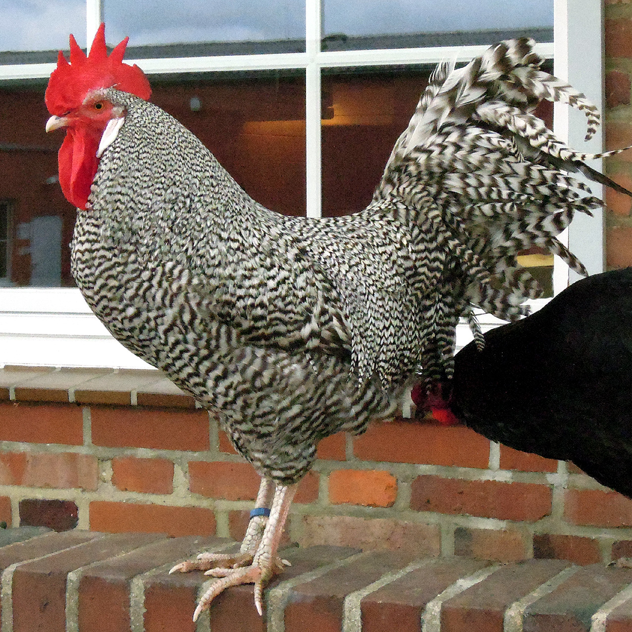 Deutscher Sperber, Hahn, ca. ein Jahr alt